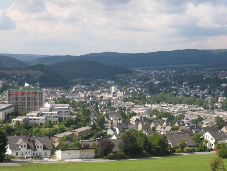 Foto über die Stadt Meschede, aufgenommen vom Osterfeuer-Platz an der Ittmecke.